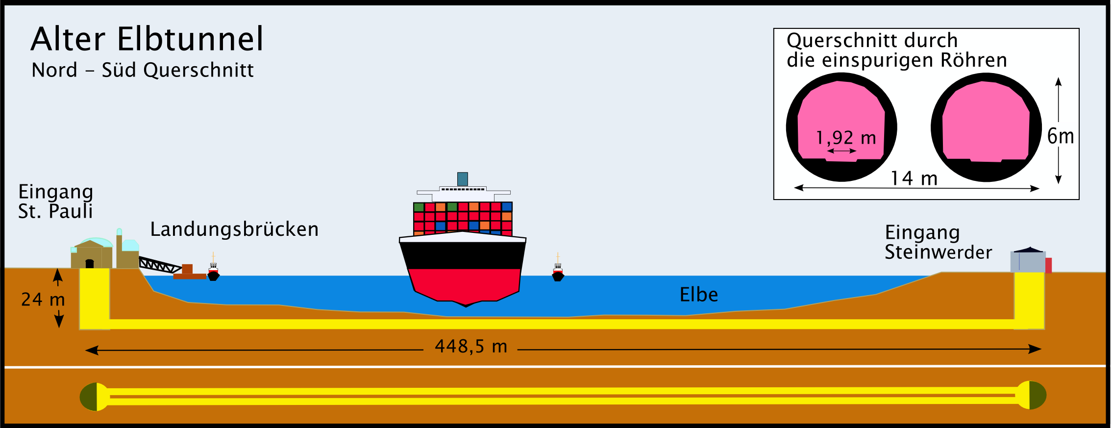 Darstellung des Alten Elbtunnels nach alten Plänen um 1911.This is a photograph of an architectural monument.